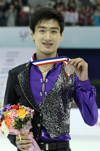 Сун Нань на Кубке Китая 2011.